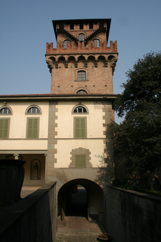 Urgnano, Castello Visconteo eretto nel 1394 dal vescovo Giovanni Visconti, passato nel 1465 a Bartolomeo Colleoni e successivamente a Giovanni Gerolamo Albani (1504-1591), tramite la moglie Laura Longhi, discendente di Abbondio Longhi, collaboratore di Bartolomeo Colleoni.